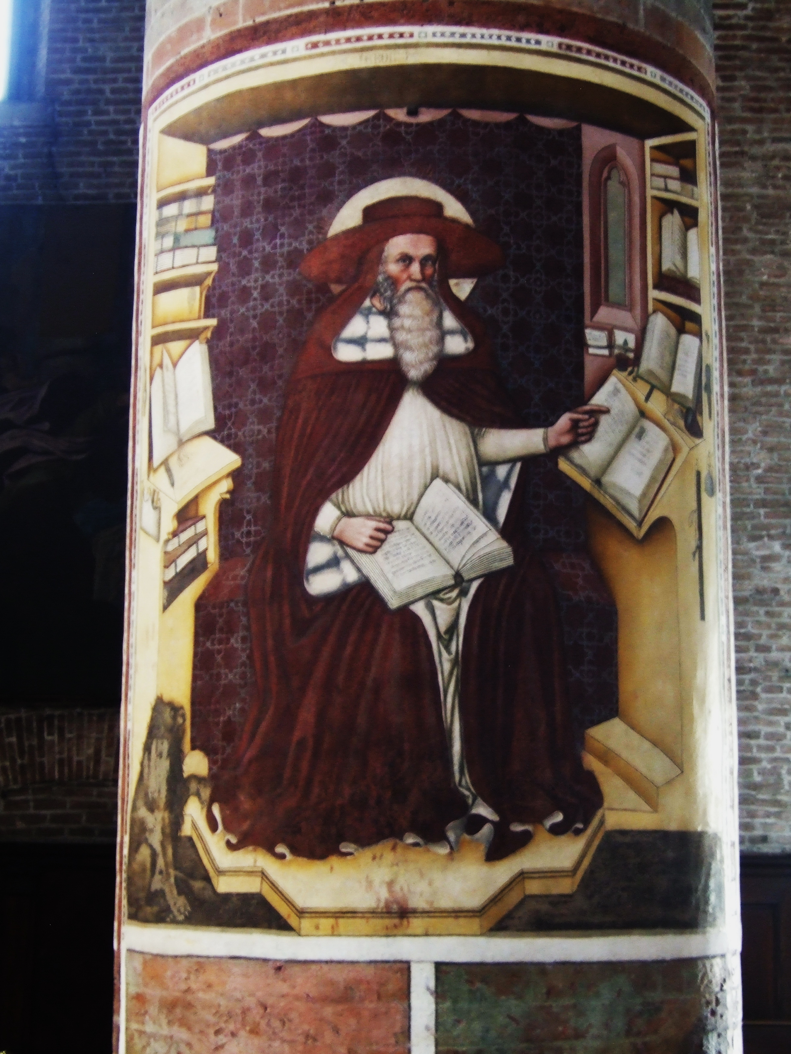 San Girolamo